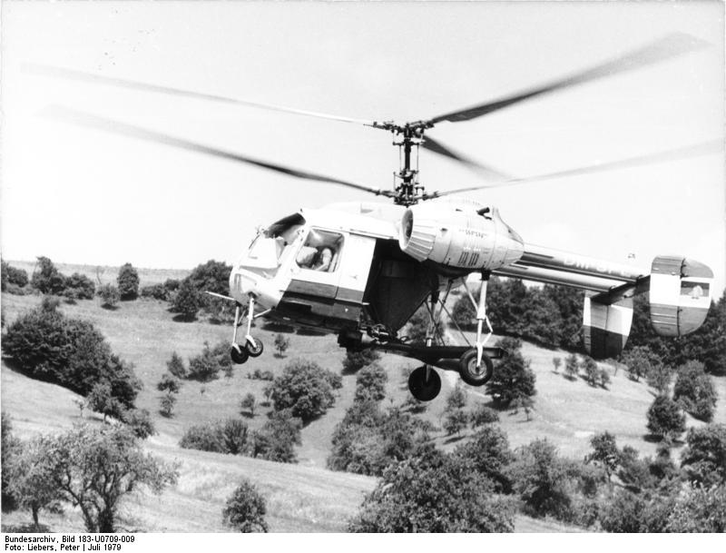 ADN-ZB/Liebers/9.7.79 Bez. Gera: Aus der Luft gedüngt werden die Weideflächen hier an den Hängen in der Nähe von Rudolstadt. Ohne die Hilfe der wendigen KA-26-Hubschrauber der Interflug wären die Grünfuttererträge auf den für Bodengeräte unzugänglichen Flächen wesentlich geringer.